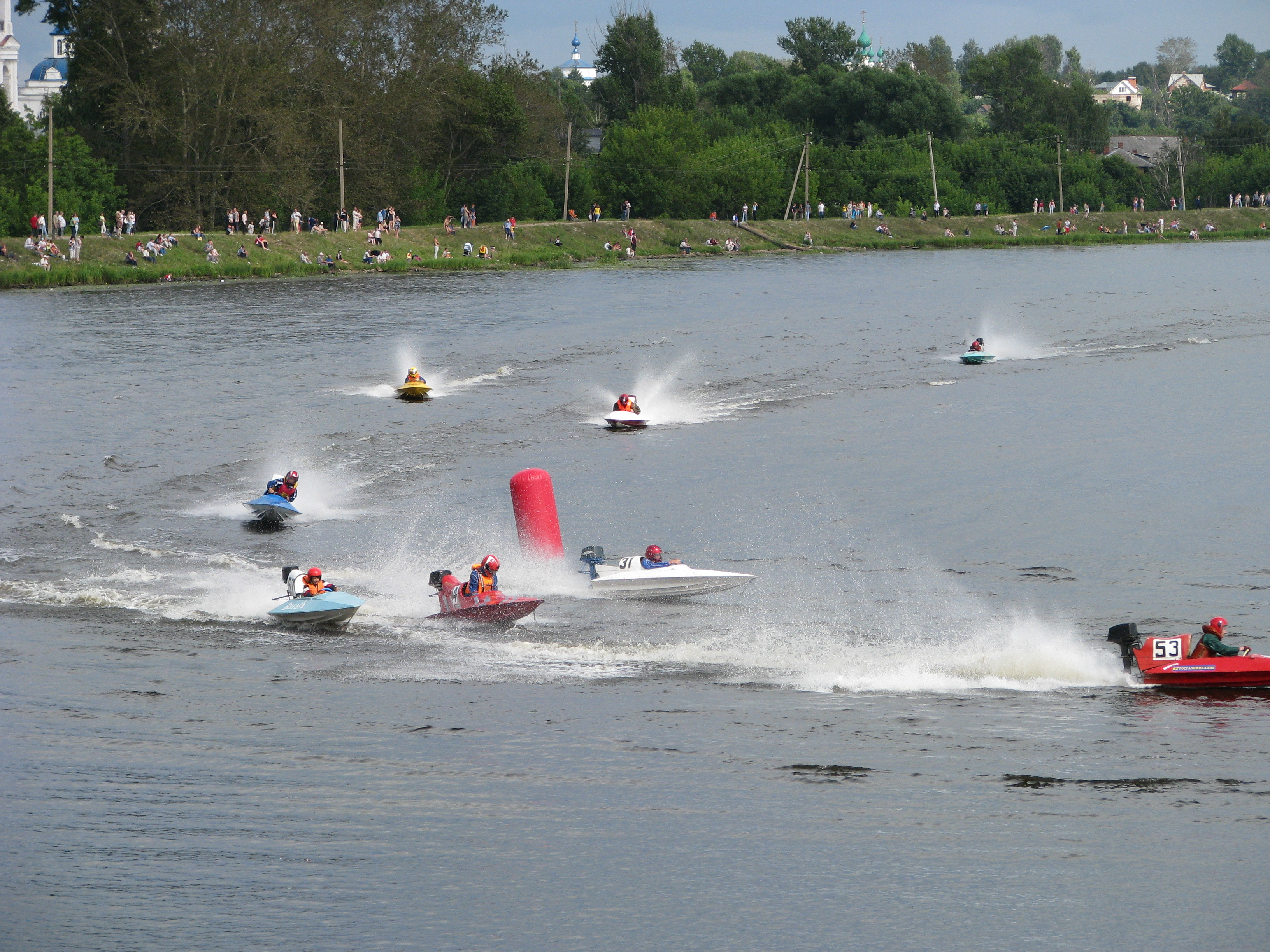 Соревнования по водно-моторному спорту. Гонка